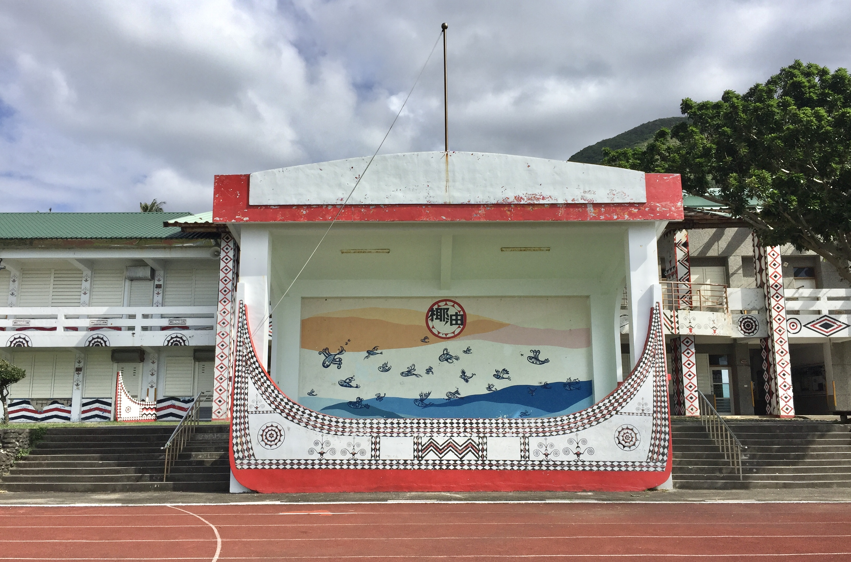 臺東縣蘭嶼鄉椰油國民小學的操場與升旗台